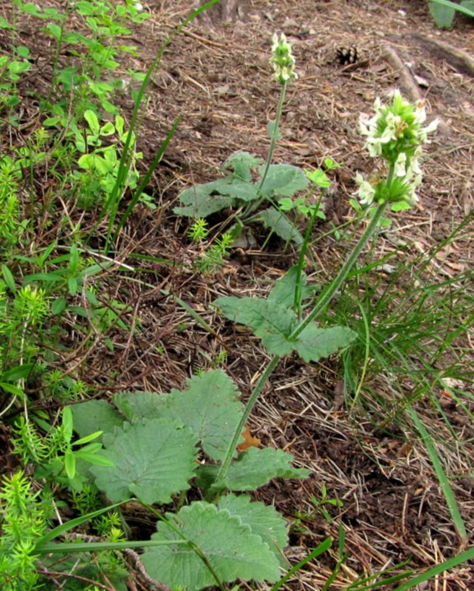 Jacquinov čistec v Setnici - Mala Grmada.